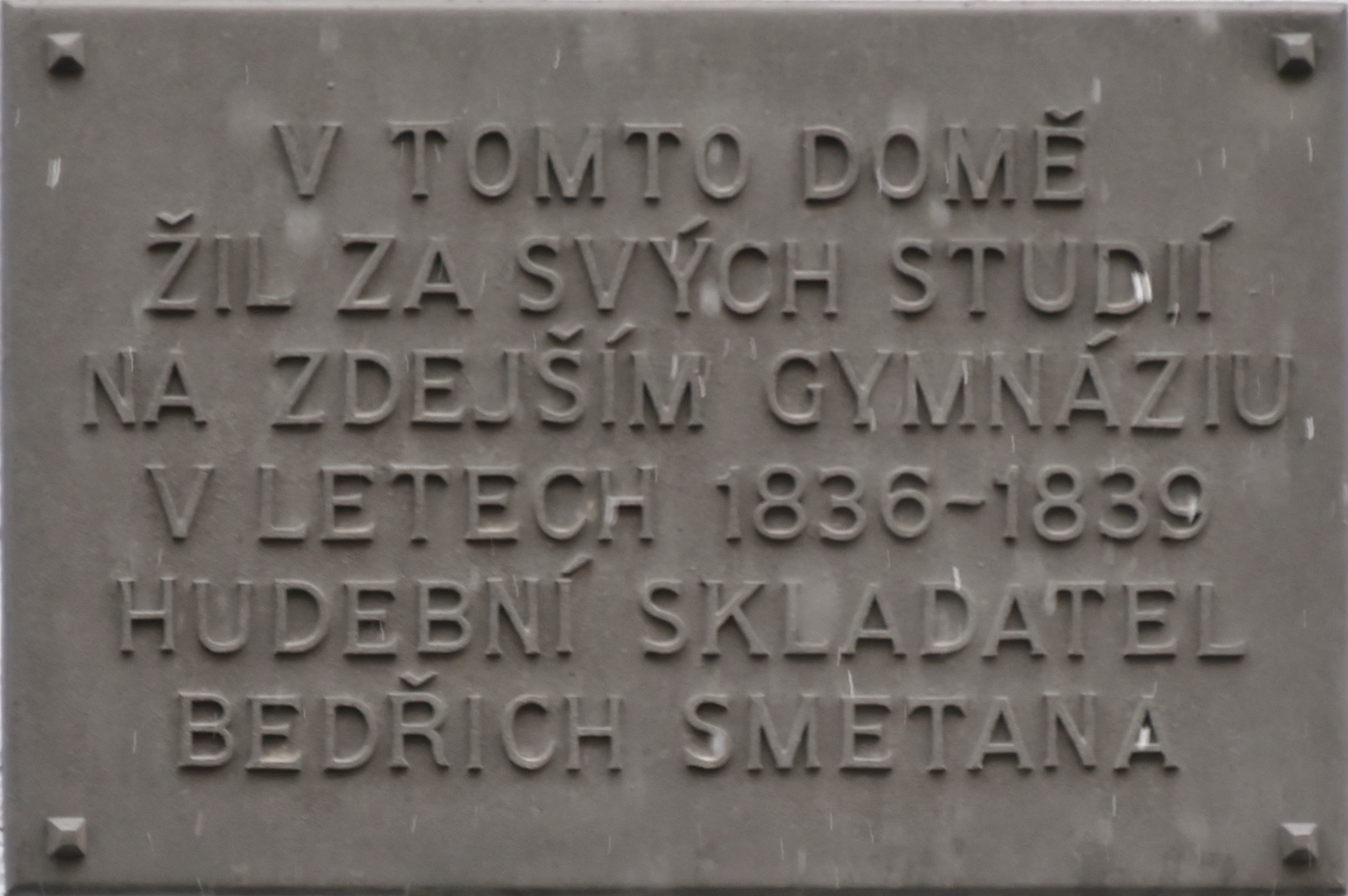 Gedenktafel für Bedrich Smetana in Havlickuv Brod